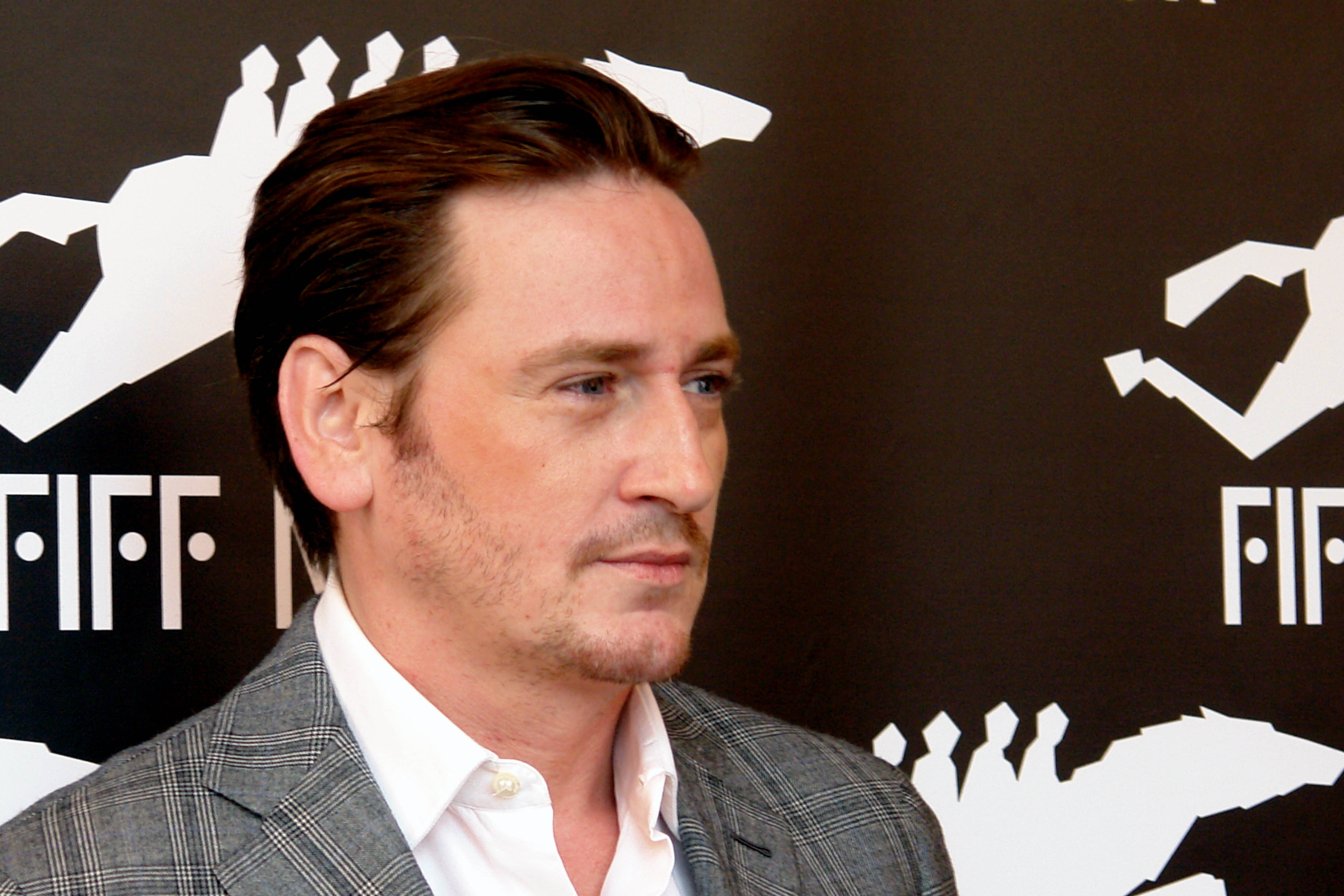 Magimel FIFF 05 octobre 2012